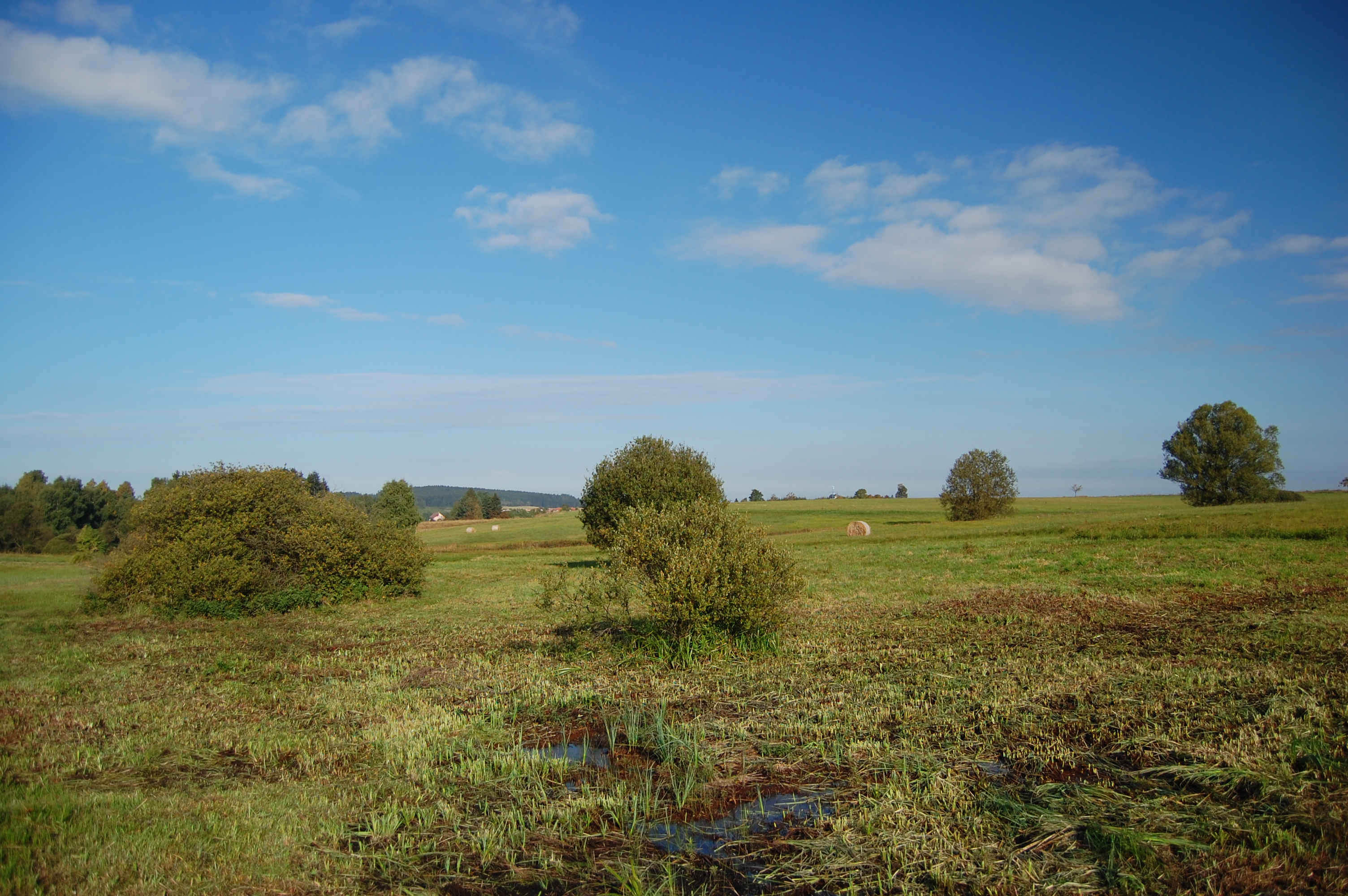 Přírodní rezervace Uhliska, Horní Štěpánov, okres Prostějov